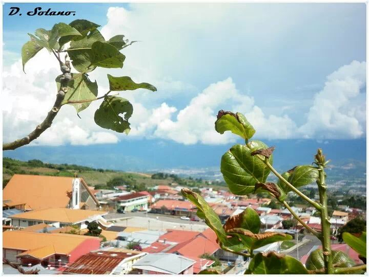 Tierra Blanca de Cartago